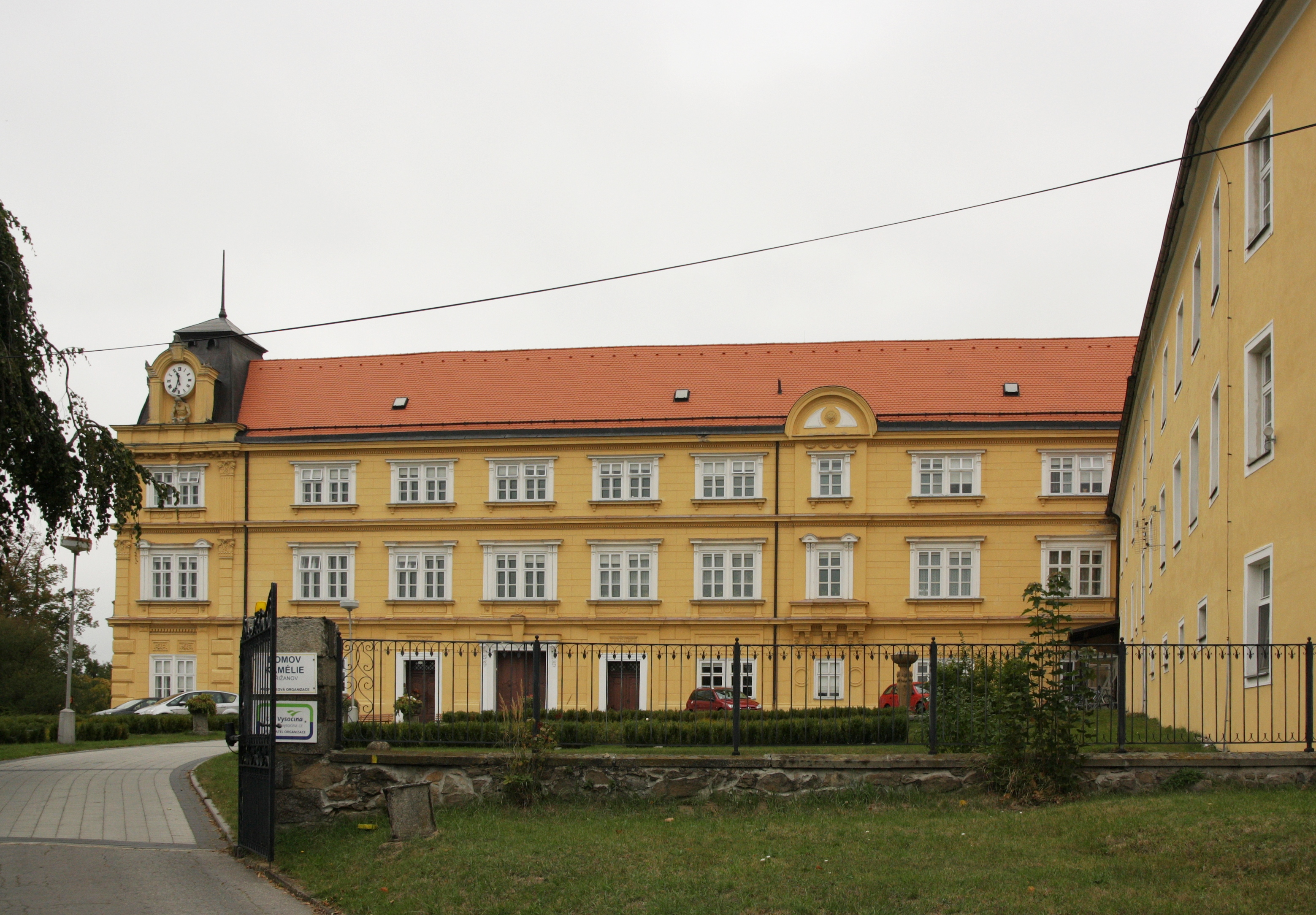 Křižanov (okres Žďár nad Sázavou) - zámek od jihu